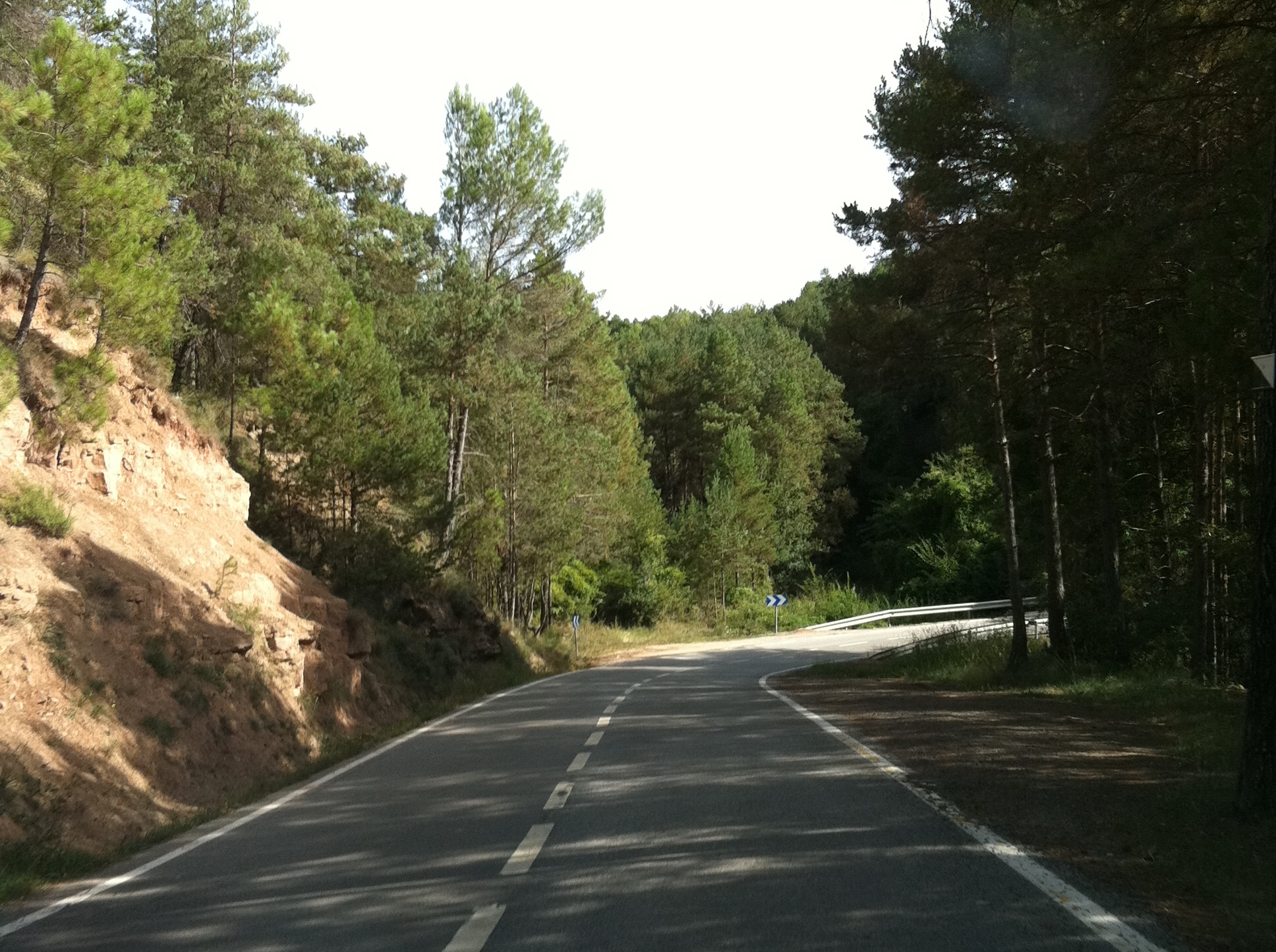 C-59 direcció Moià